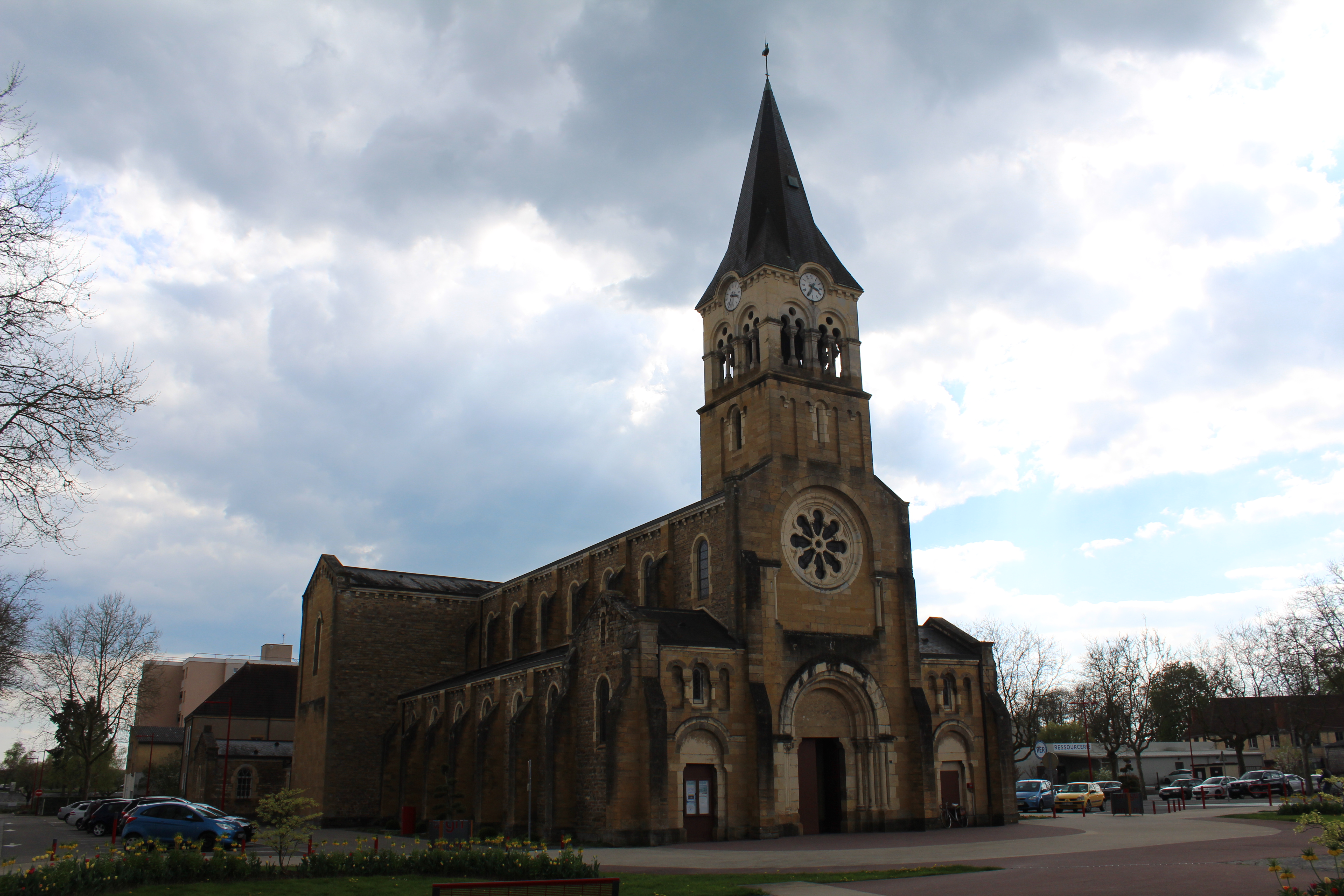 Église Saint-Maurice de Gueugnon.